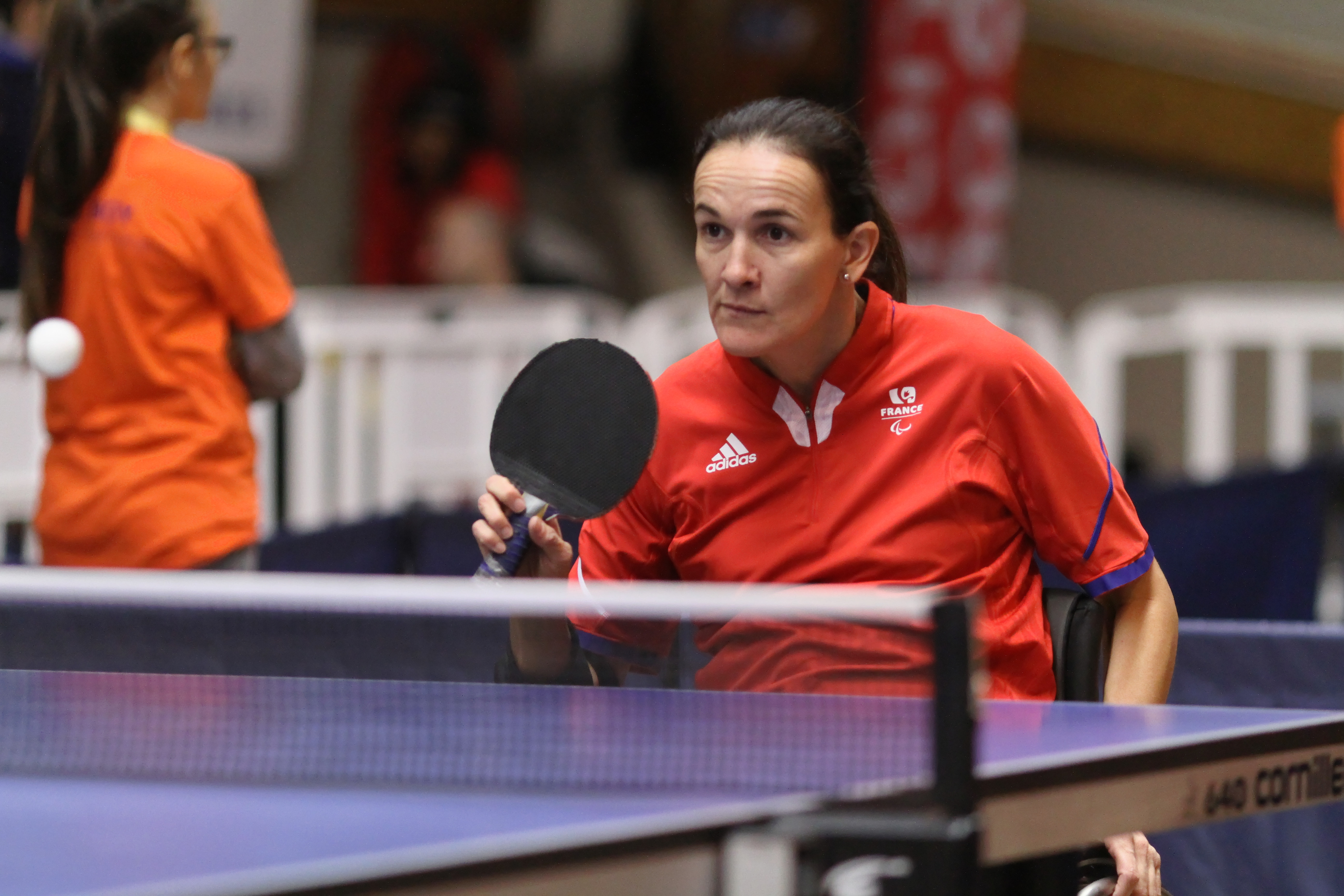 BERTRAND Fanny (FRA)